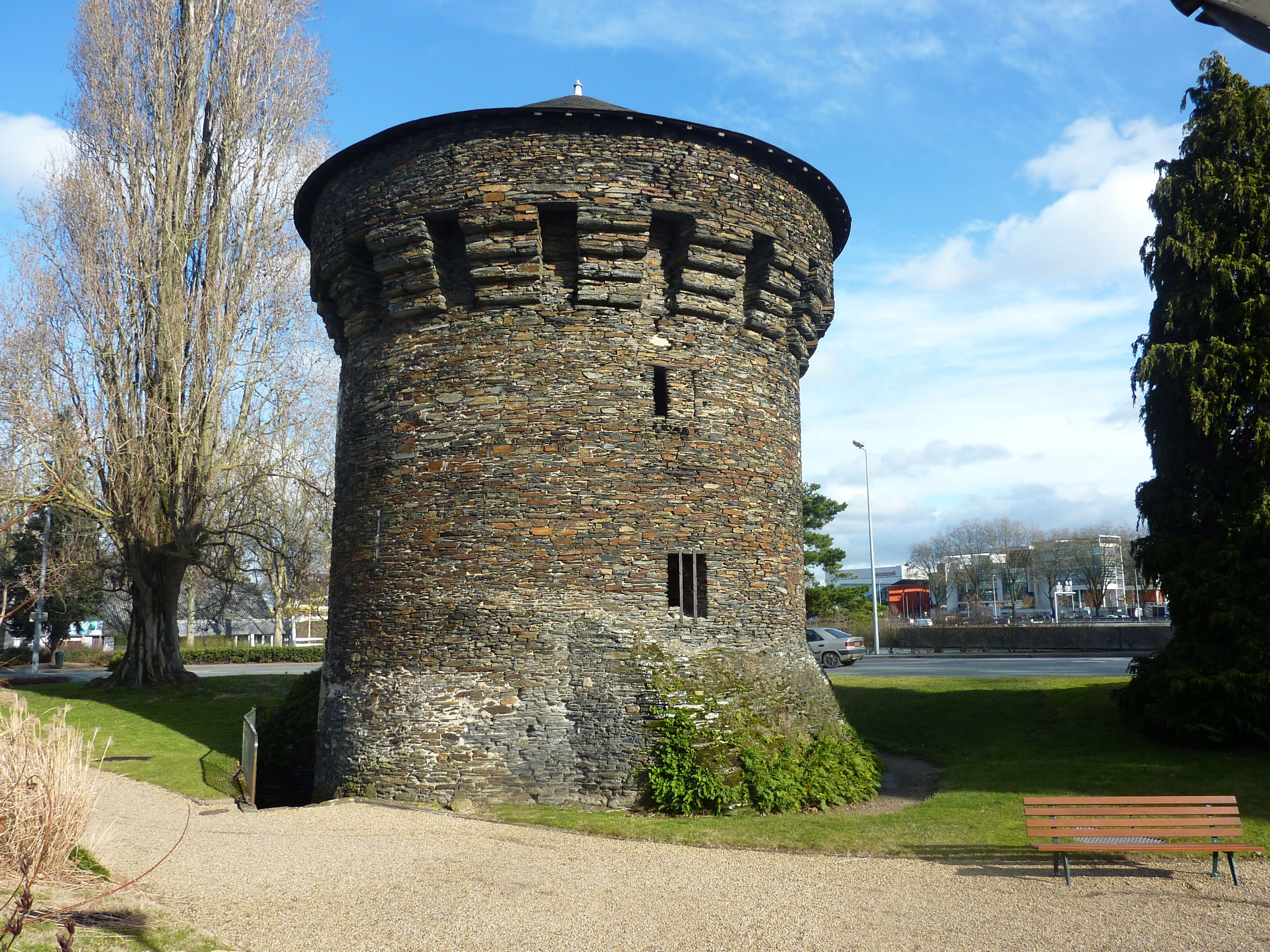 La tour des Anglais, Angers, Maine-et-Loire, France. Datant du 15 {e } siècle, elle est située près du Pont de la Haute-Chaîne, côté ouest de la Maine.